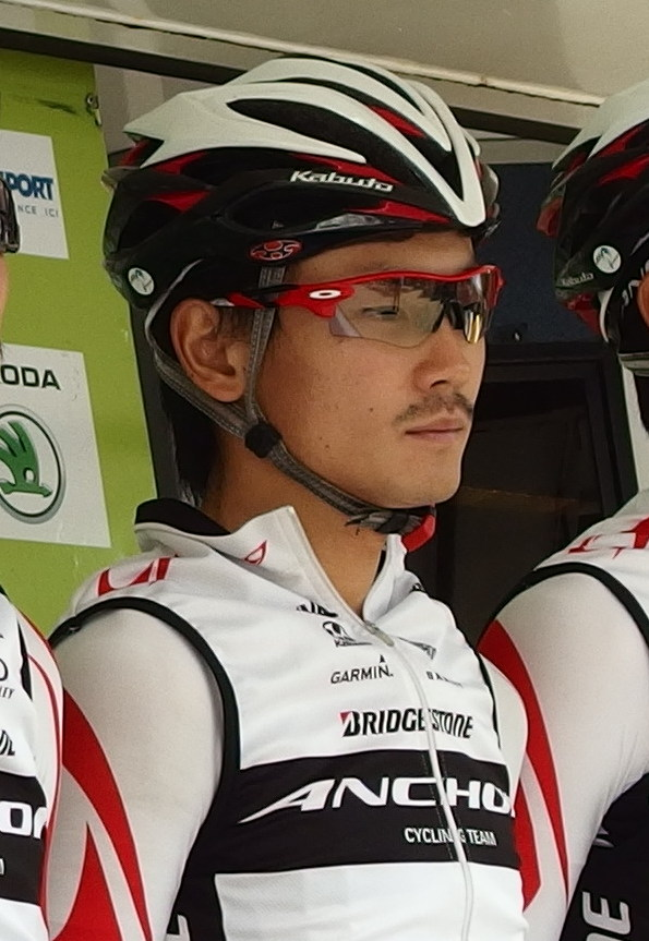 Tour de Bretagne 2015 - Présentation des équipes au départ de la troisième étape à Baud - Équipe Bridgestone Anchor Depicted person: Sho Hatsuyama